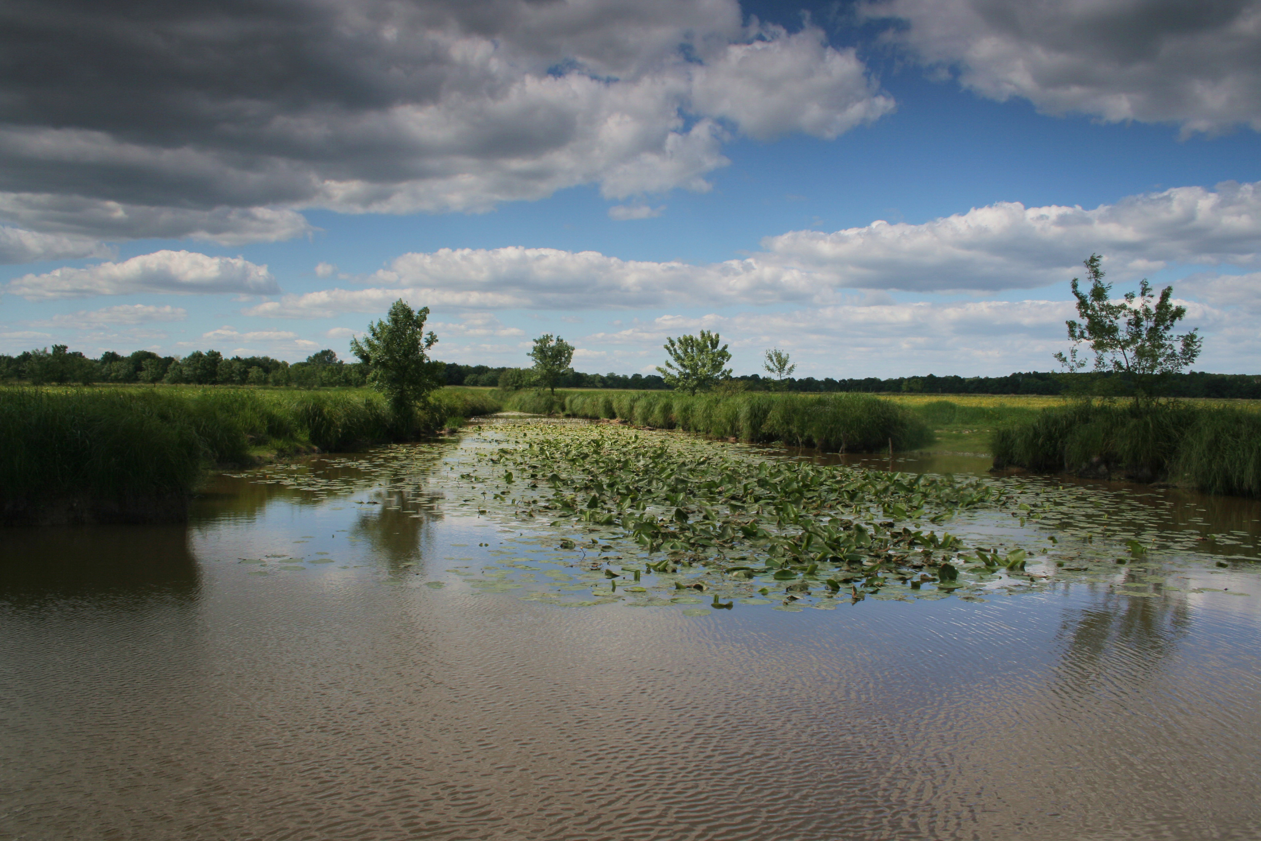 Paysage de l'Ile Saint-Aubin